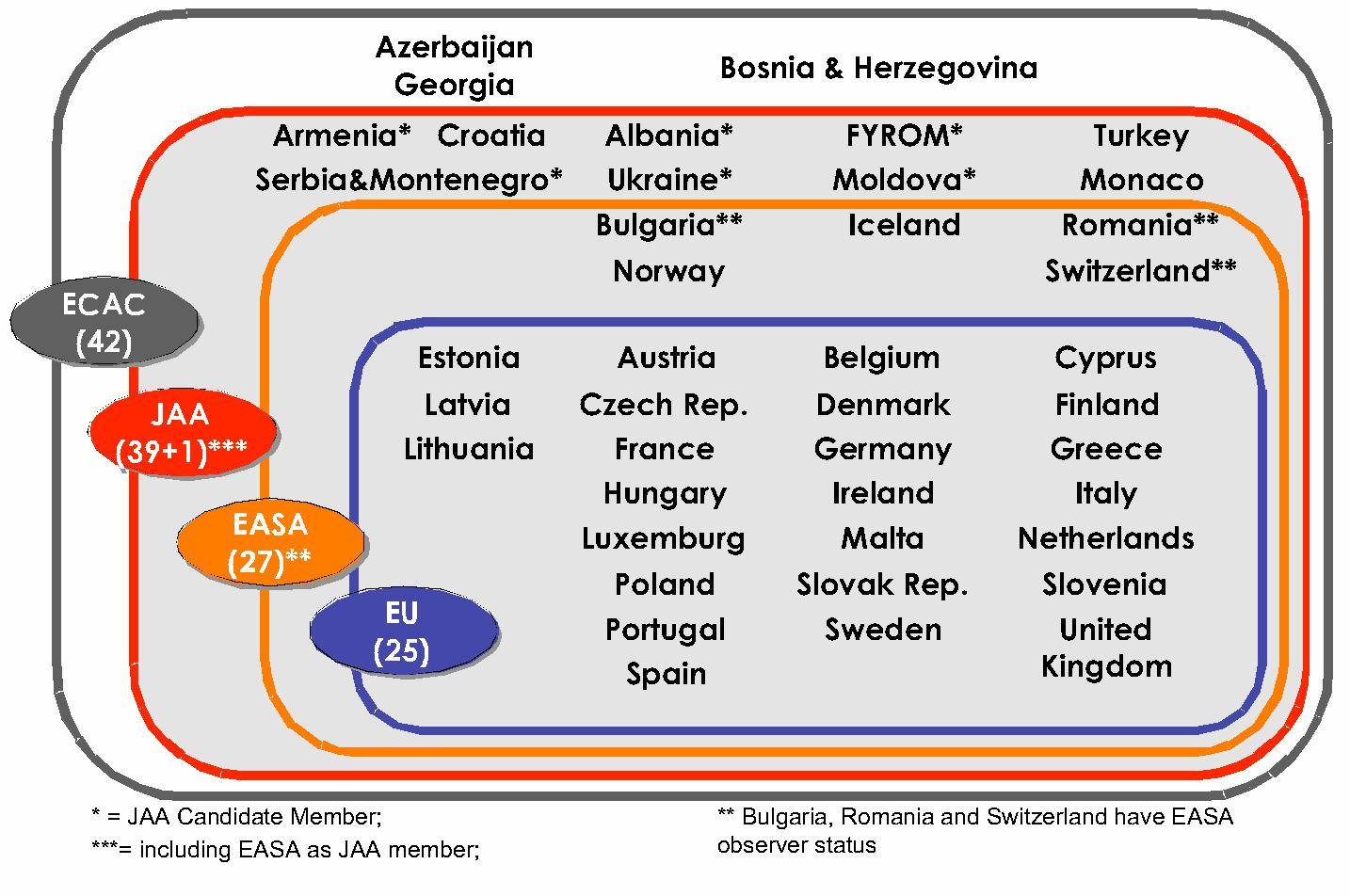 EASA diagramm